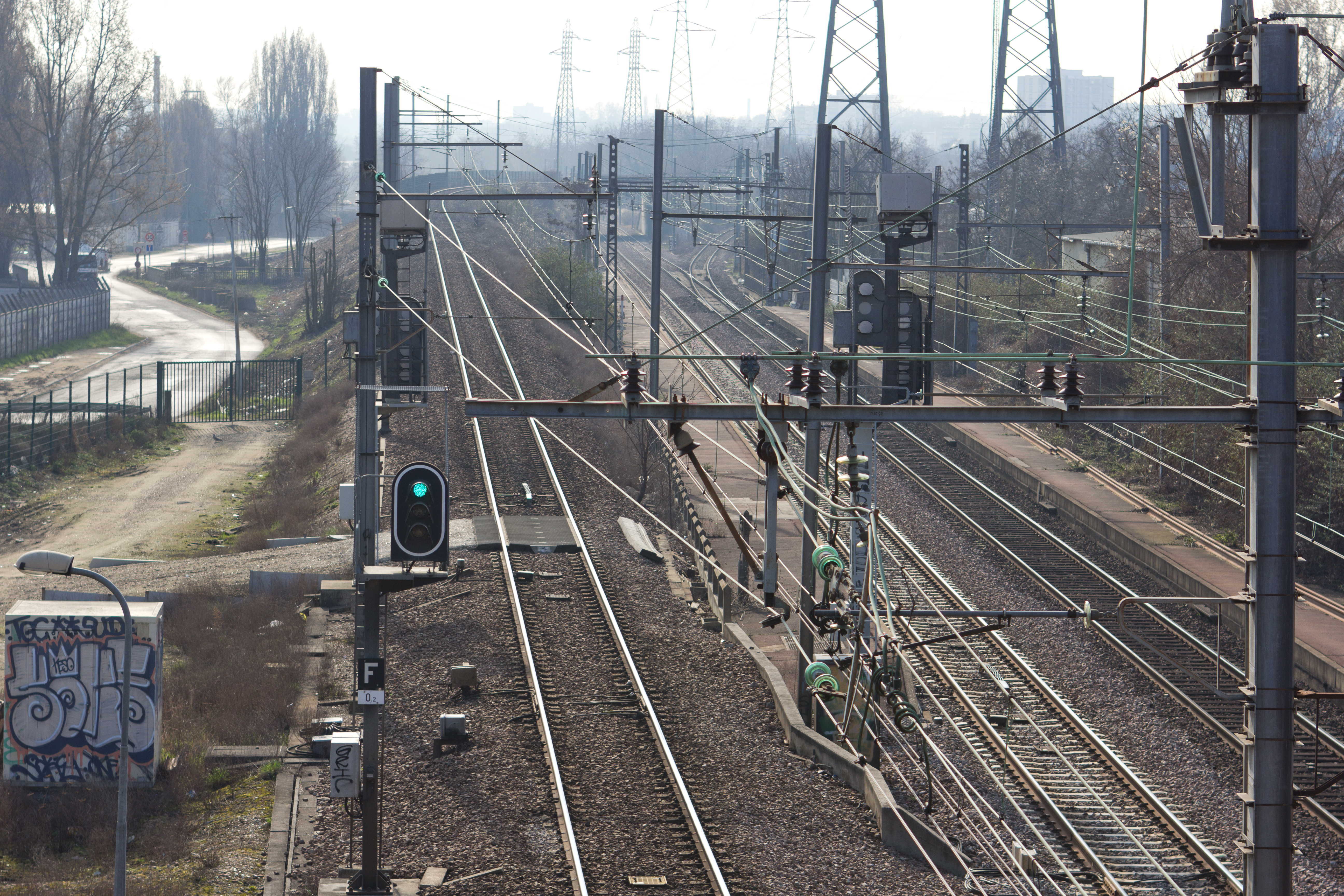 Ancienne gare de Grigny-Val-de-Seine vue depuis le nord, ligne de Villeneuve-Saint-Georges à Montargis, Grigny, Essonne, France